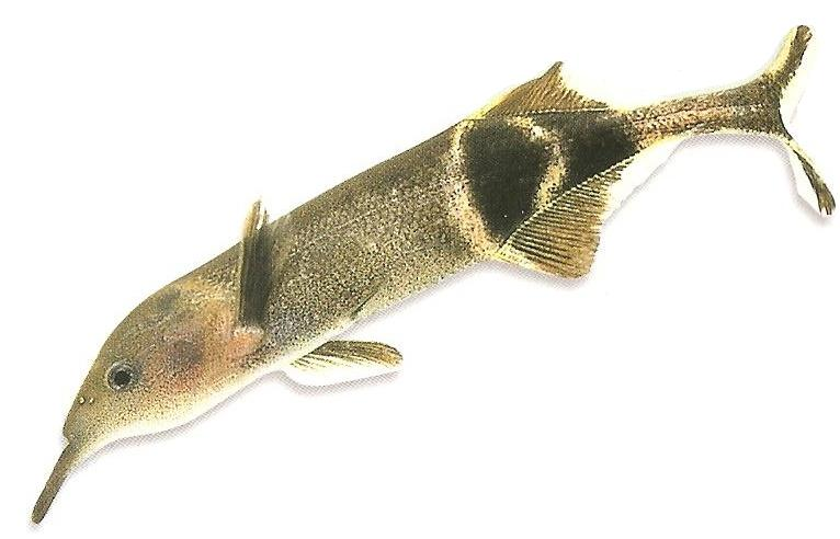 foto da me eseguita ed elaborata al computer del pesce Gnathonemus_Petersii